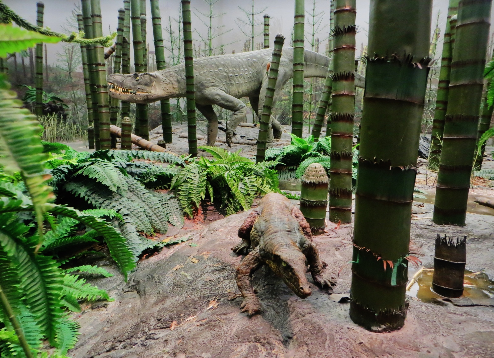 Triassic landscape - Took the picture at Museum am Löwentor, Stuttgart (Germany). Paratypothorax in foreground and Batrachotomus in the background